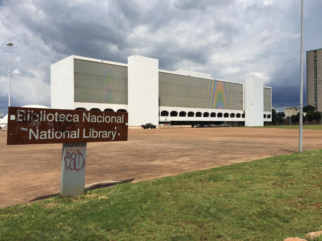 imagen de la Biblioteca Nacional de Brasília